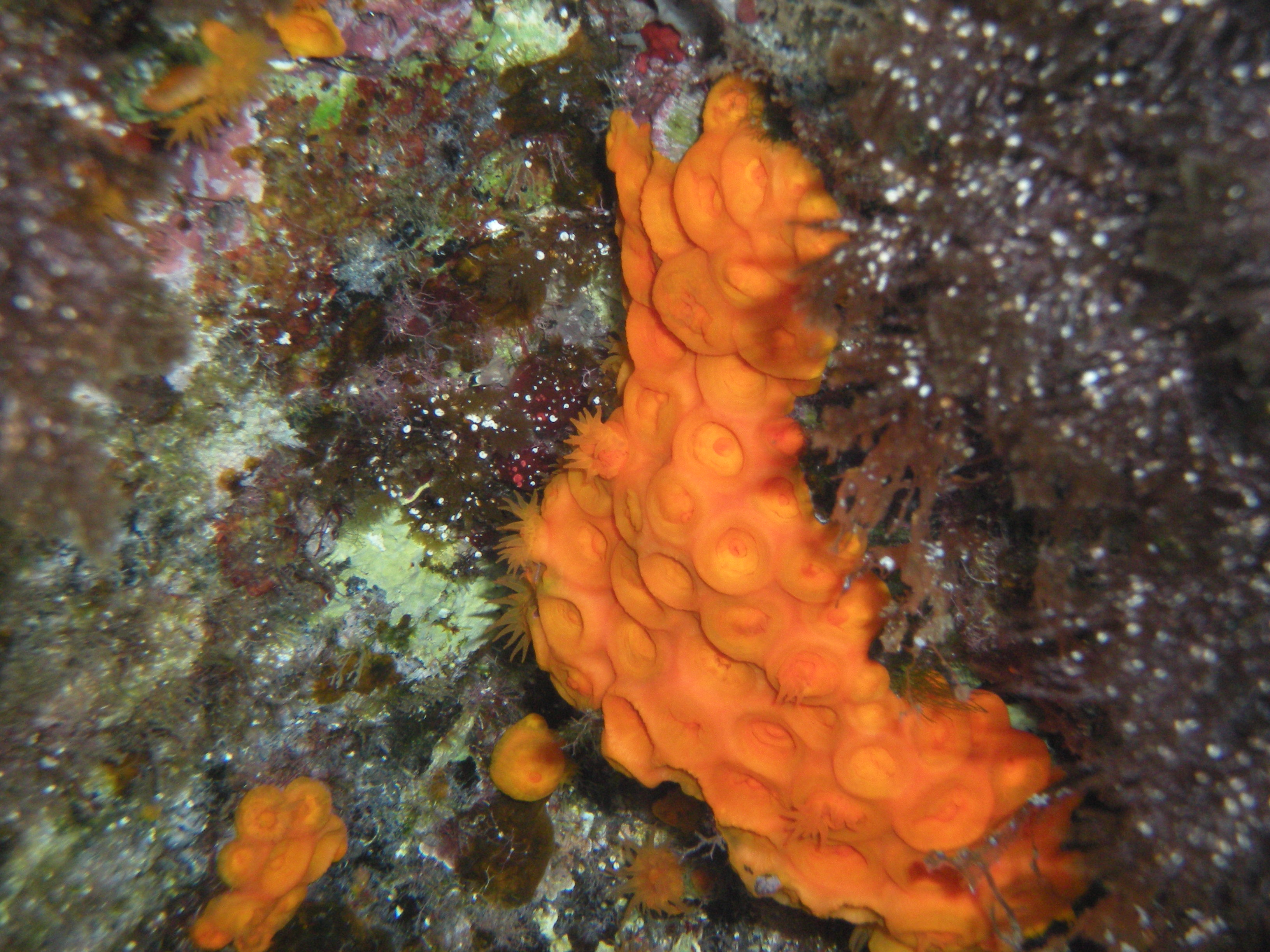 Astroides calycularisLinosa, Mediterranean Sea